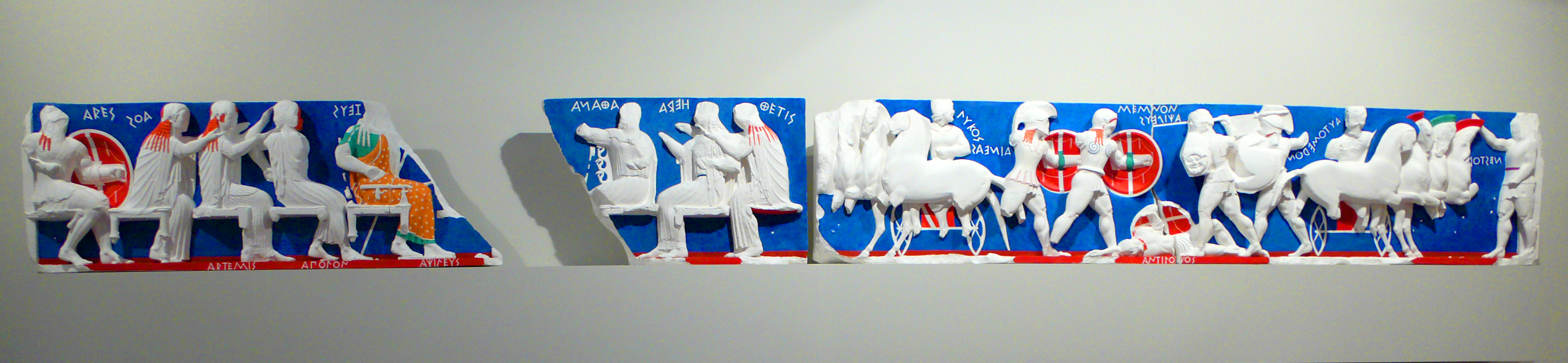 Reconstrucción parcial en color del friso oriental del "Tesoro de los Sifnios". Friso de seis metros que representa mito de la Guerra de Troya: Aquiles desafía a Memnón a un combate para vengar la muerte de su amigo Antíloco. Nombres que aparecen: Ares, Eos, Apolo, Atenea, Hera, Lico, Eneas, Memnón, Aquiles, Antíloco, Automedón y Néstor. Exposición "El color de los dioses", Alcalá de Henares, 2010.